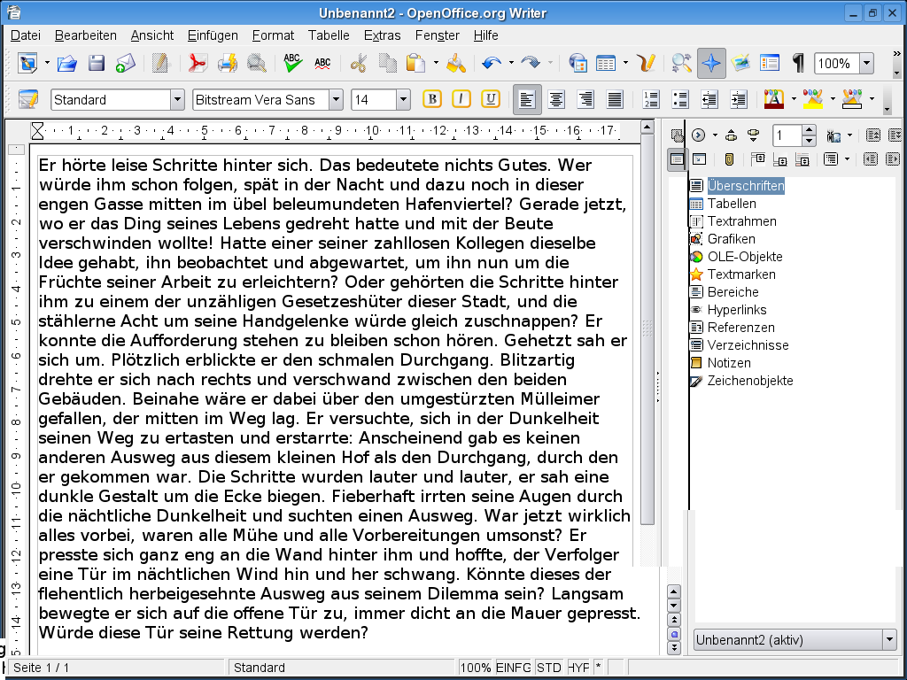 2.0 Writer (Linux, KDE, German)